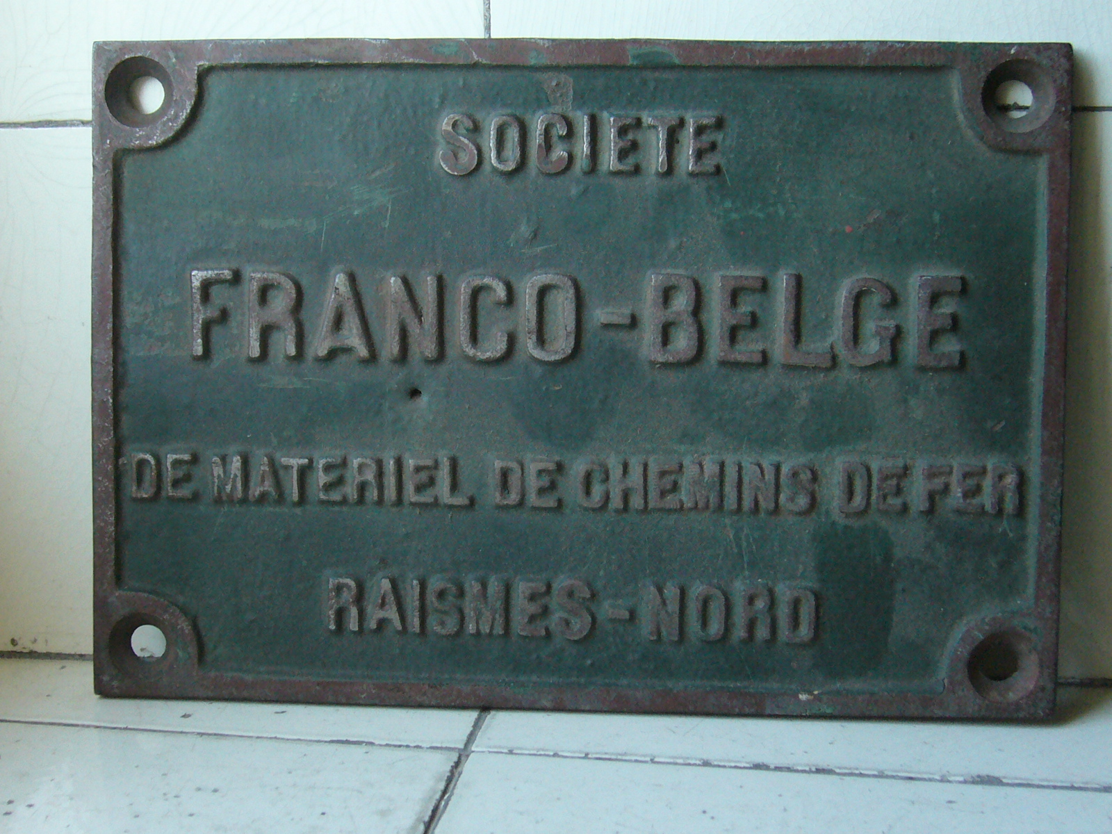 plaque de construction